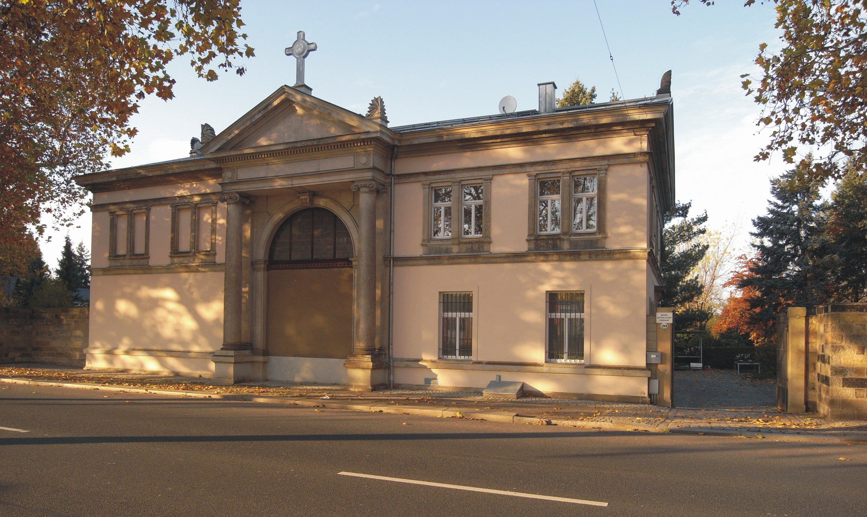 Dresden, Eingangsbereich des Neuen Katholischen Friedhofs, Bremer Straße (Deutschland, Sachsen)